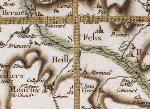 Heillles, carte de Cassini